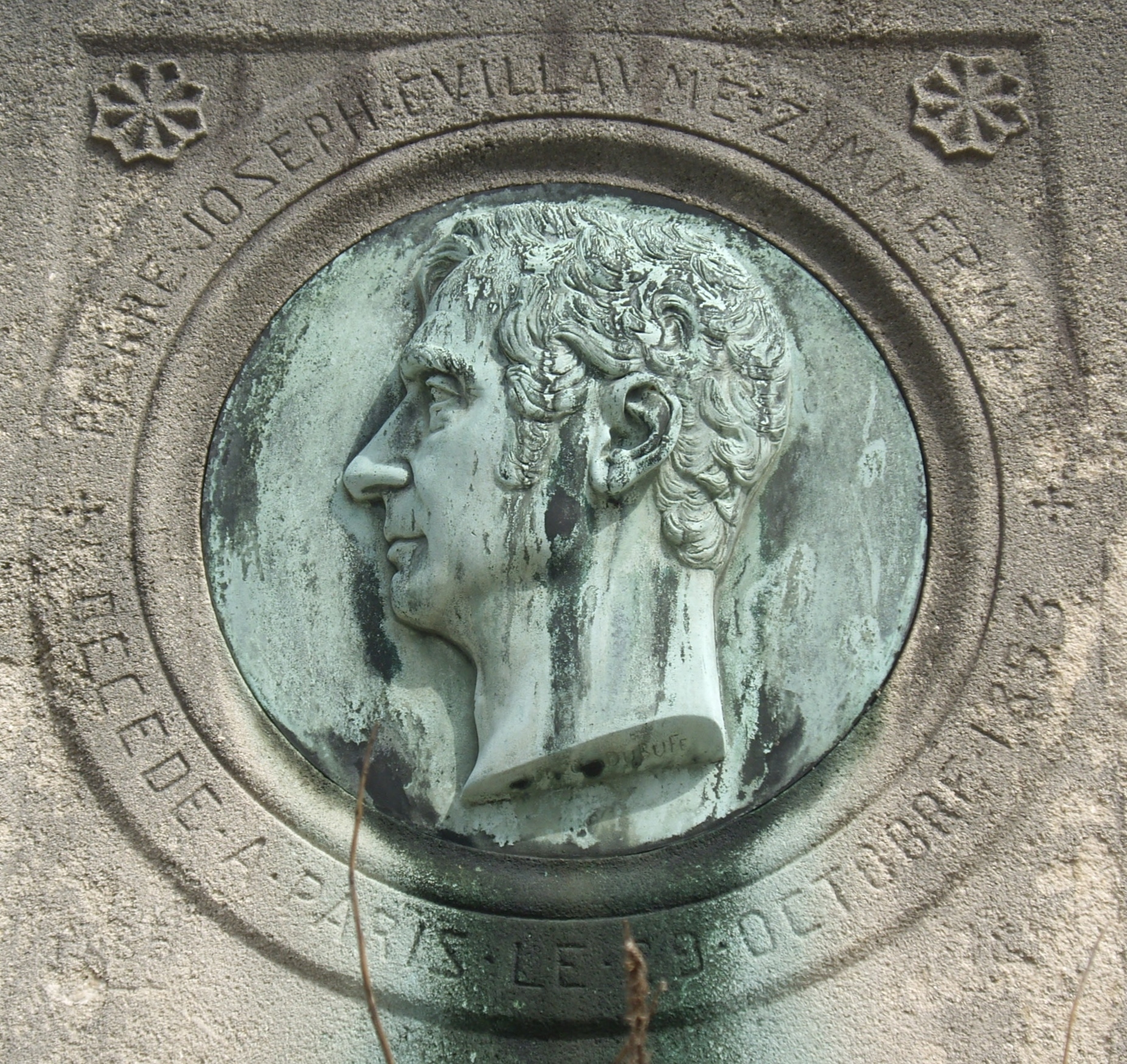 Tombe de Pierre Zimmerman, cimetière d'Auteuil, division 9. Médaillon.